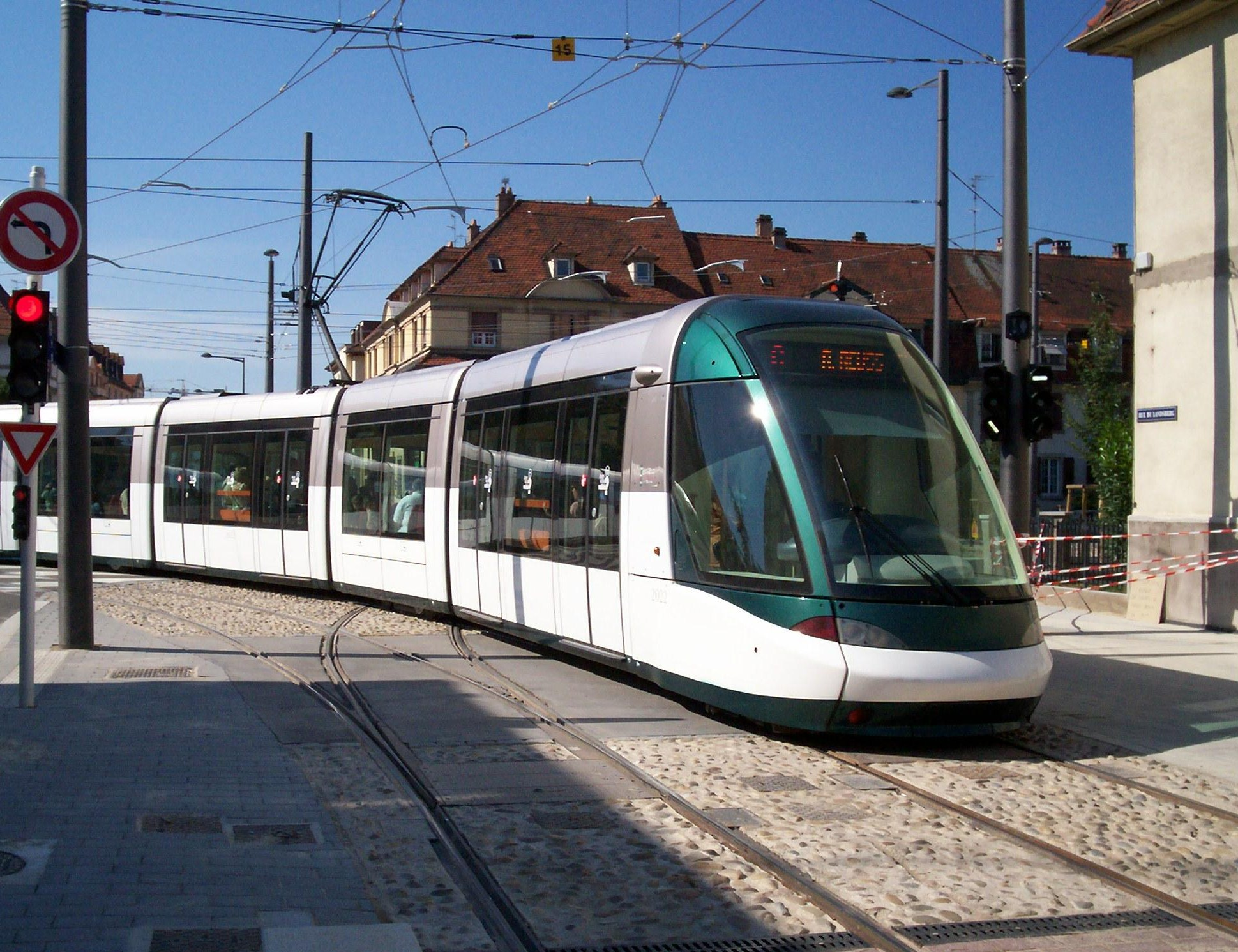 Tramway de Strasbourg Ligne C à Landsberg, alors nouvelle station mais nouveau point de correspondance du réseau, le 26 Août 2007, jour de l'inauguration de l'extension du réseau Tramway Strasbourgeois